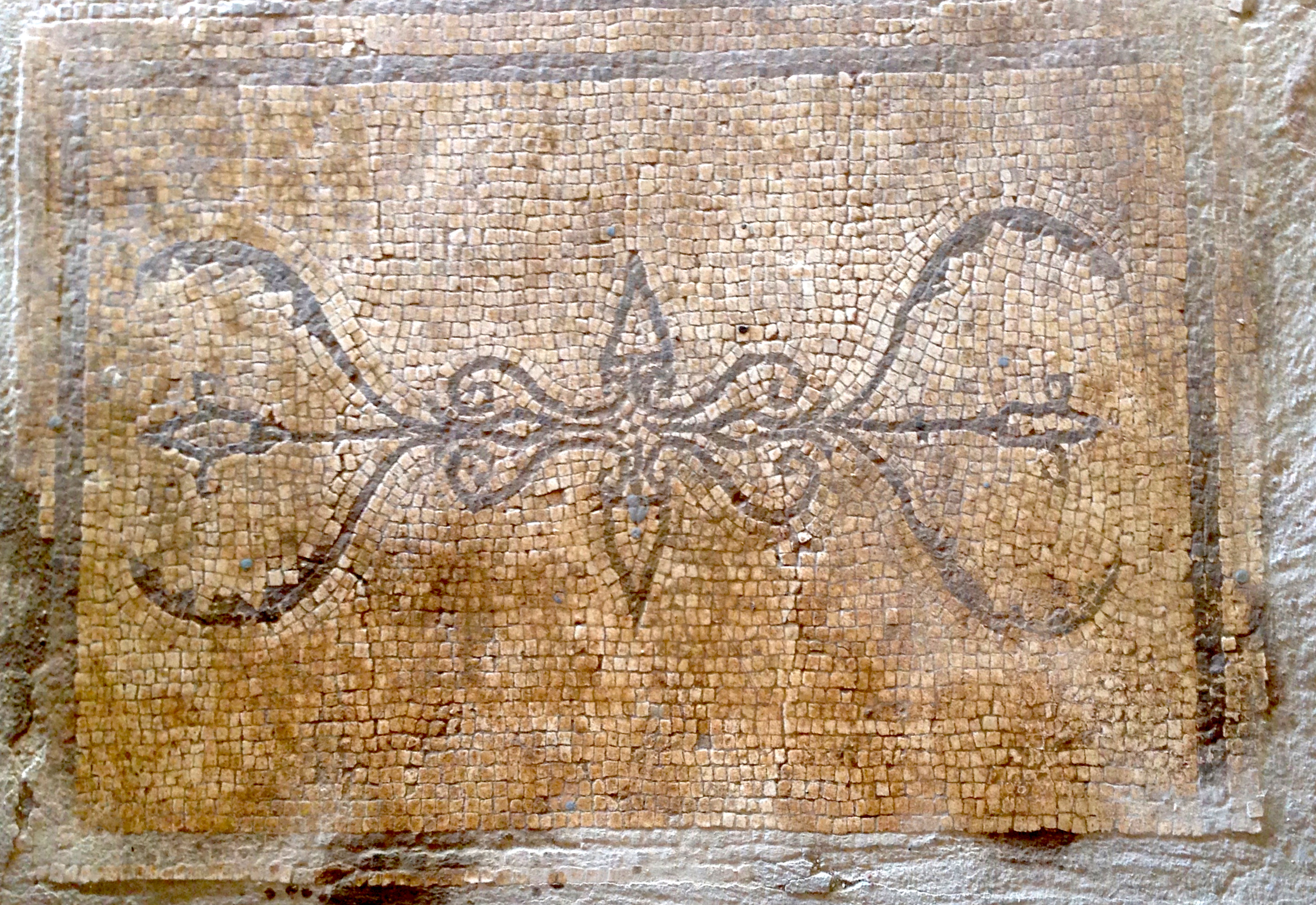 Villa romana di Cottanello Soglia di una camera.